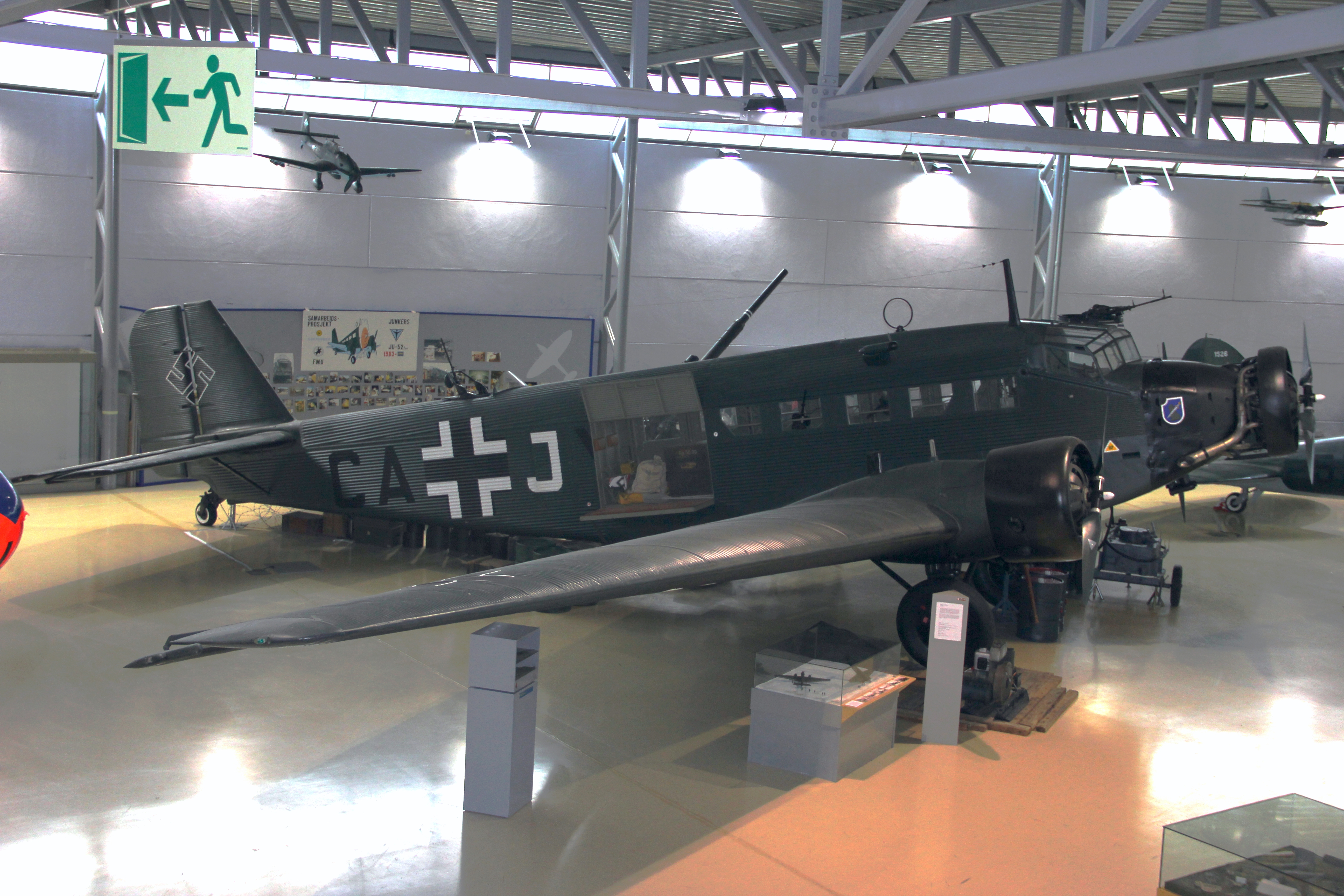 Junkers Ju-52